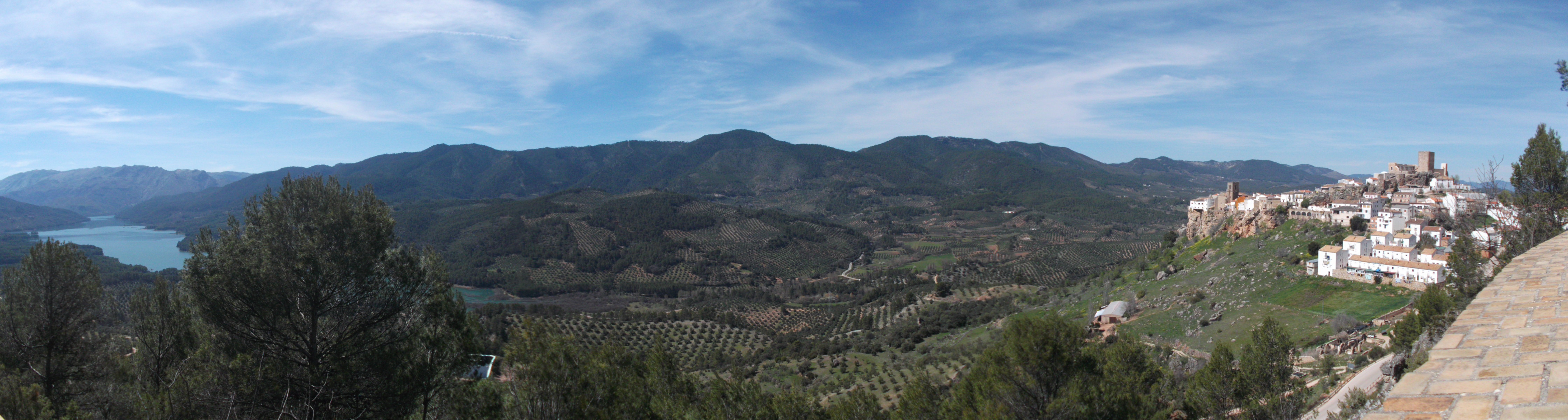 Panorámica del Pantano del Tranco y la villa de Hornos de Segura desde el Mirador de las Celadillas This is a photography of a Special Area of Conservation in Spain with the ID: ES0000035. Natura2000 entry, EEA entry